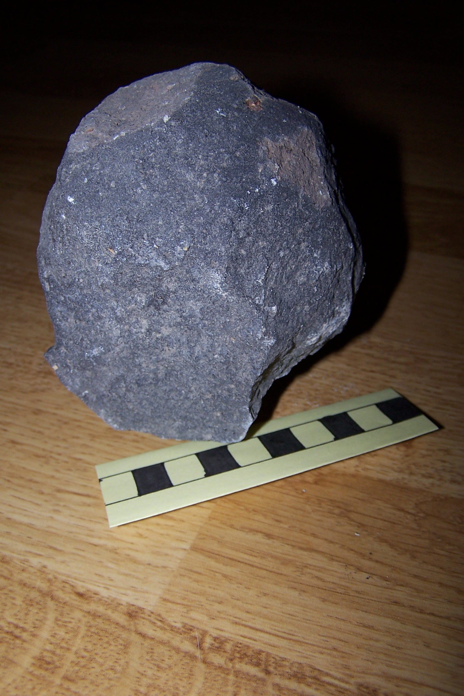 Net gemaakt, 31-05-2006